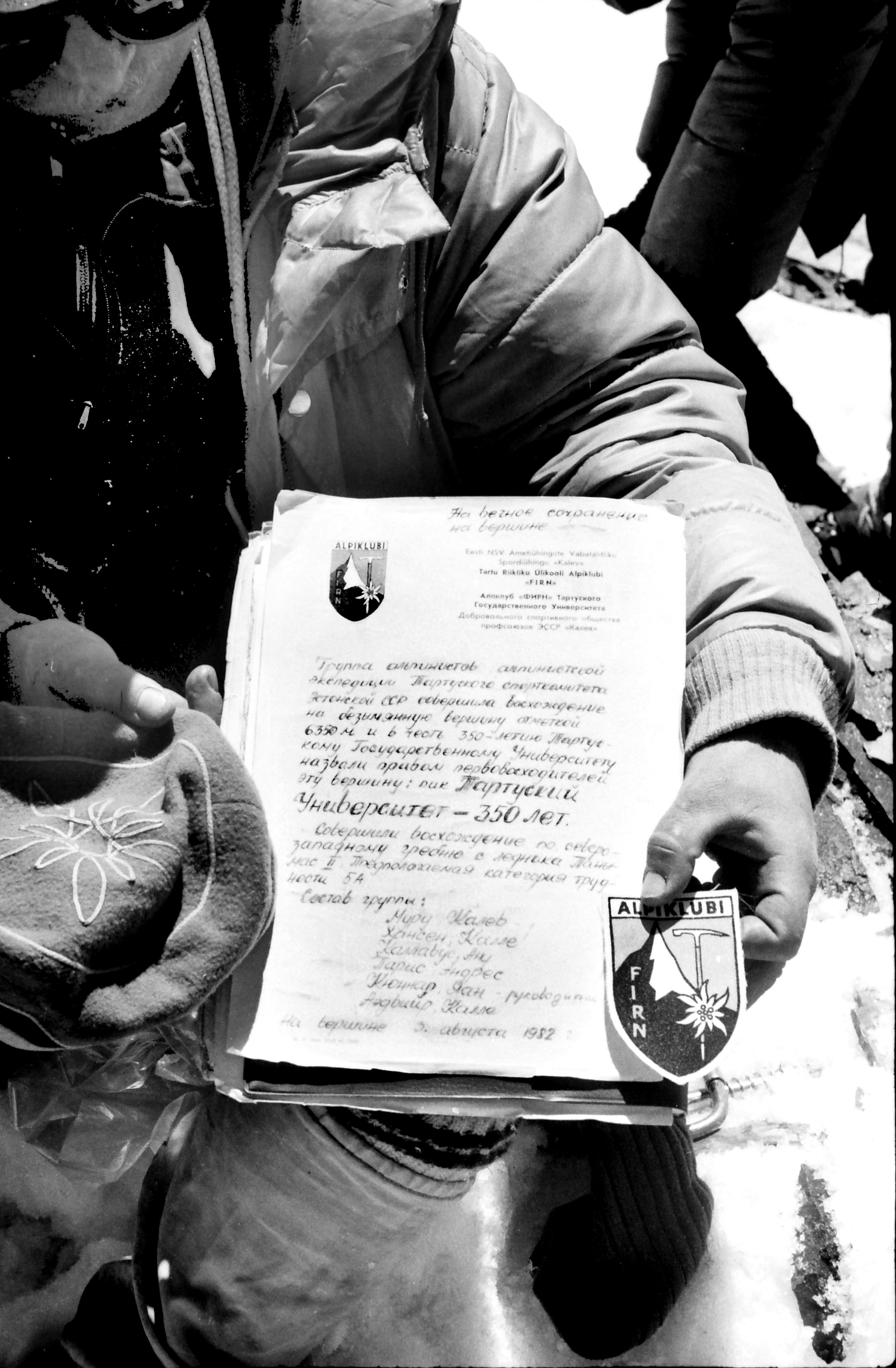 Ekspeditsioon mäetipule "Tartu Ülikool 350".